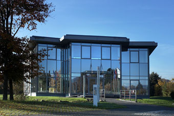 Das Kludi Forum in Menden